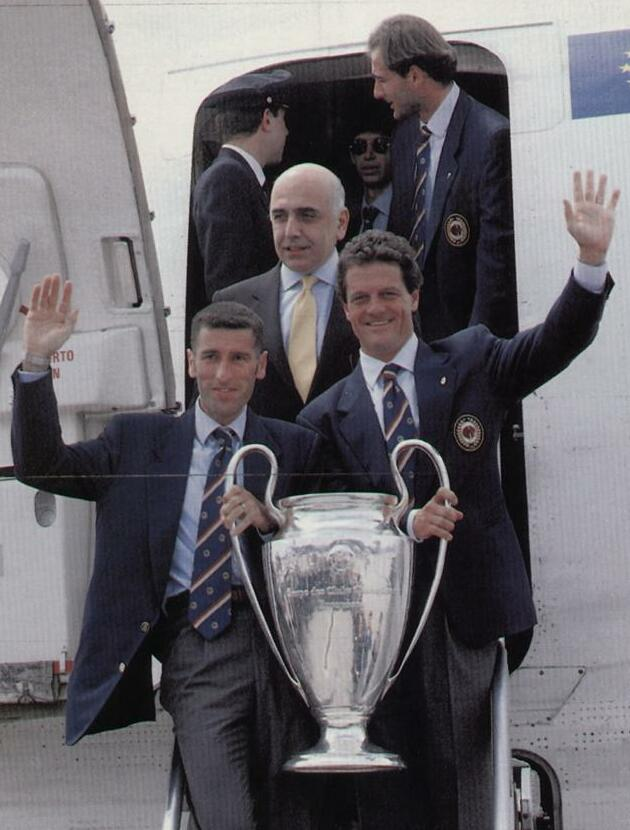 Il giocatore Mauro Tassotti, l'allenatore Fabio Capello e il dirigente Adriano Galliani del Milan, con la Champions League vinta dai rossoneri ad Atene nel 1994, qui al rientro in Italia; dietro di loro, si scorge il portiere Sebastiano Rossi. Licensing 1994 1994 1994 1994